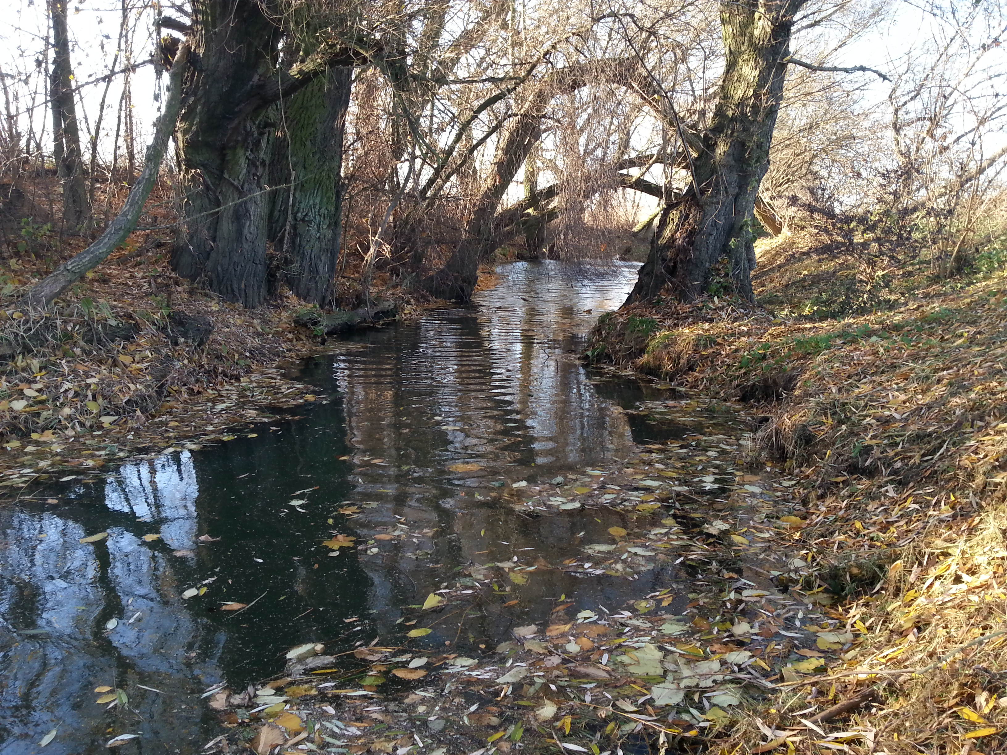 Rzeka Utrata w miejscowości Pęcice w listopadzie 2015.